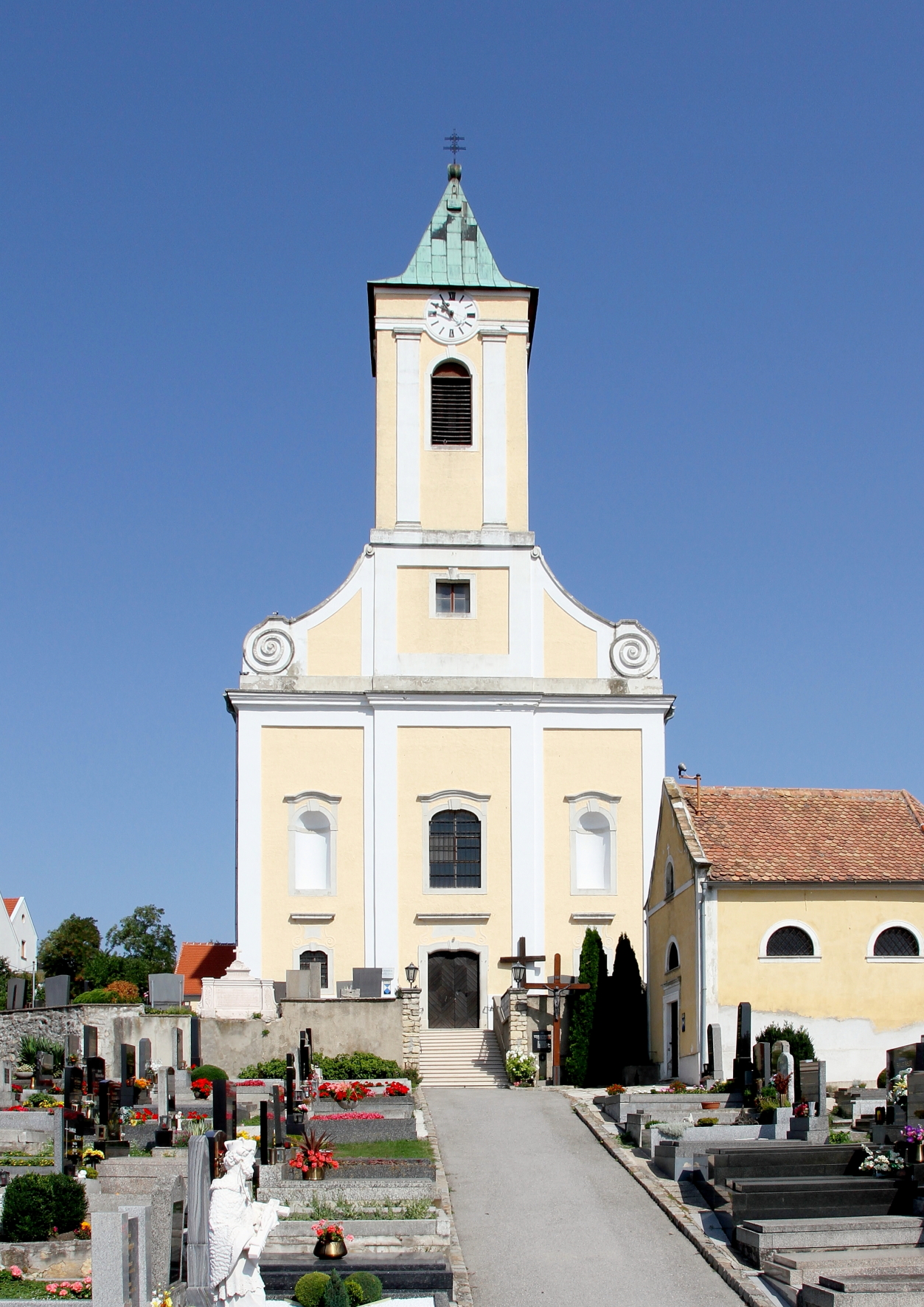 Die alte röm.-kath. Pfarrkirche hl. Georg in der burgenländischen Marktgemeinde Jois.